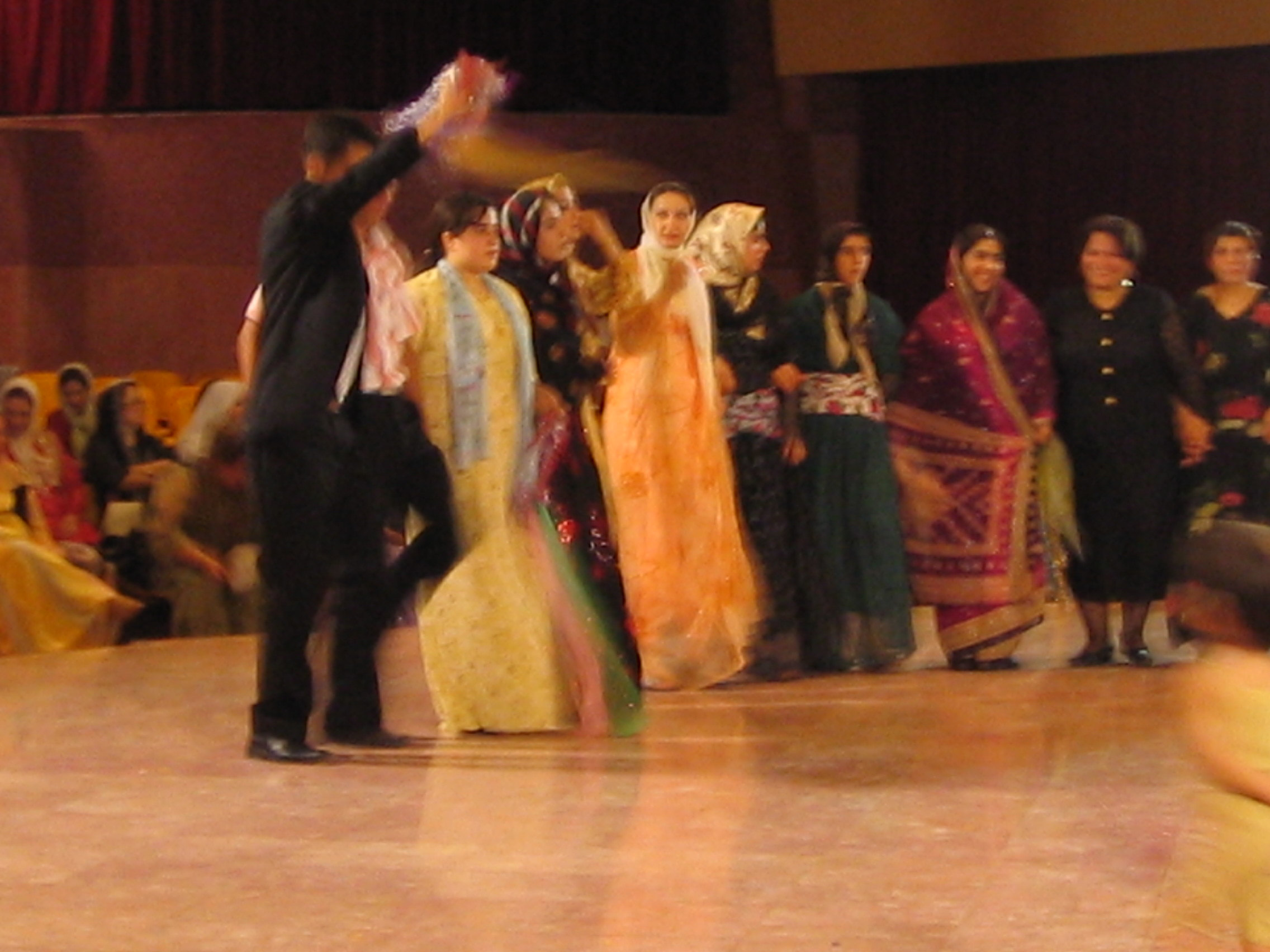 Kurdish dance during a wedding in Sanandaj, Iran.